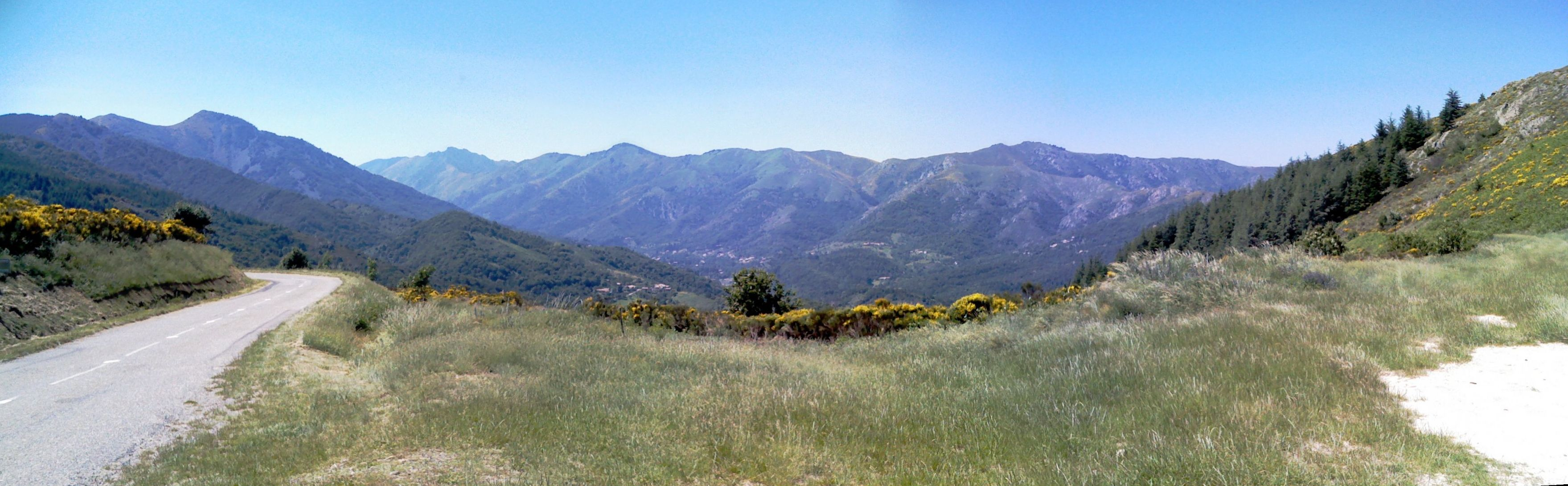 Le col de la Croix de Millet, en Ardèche. This panoramic image was created with Autostitch. Stitched images may differ from reality.